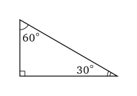 Triangle de l'écolier